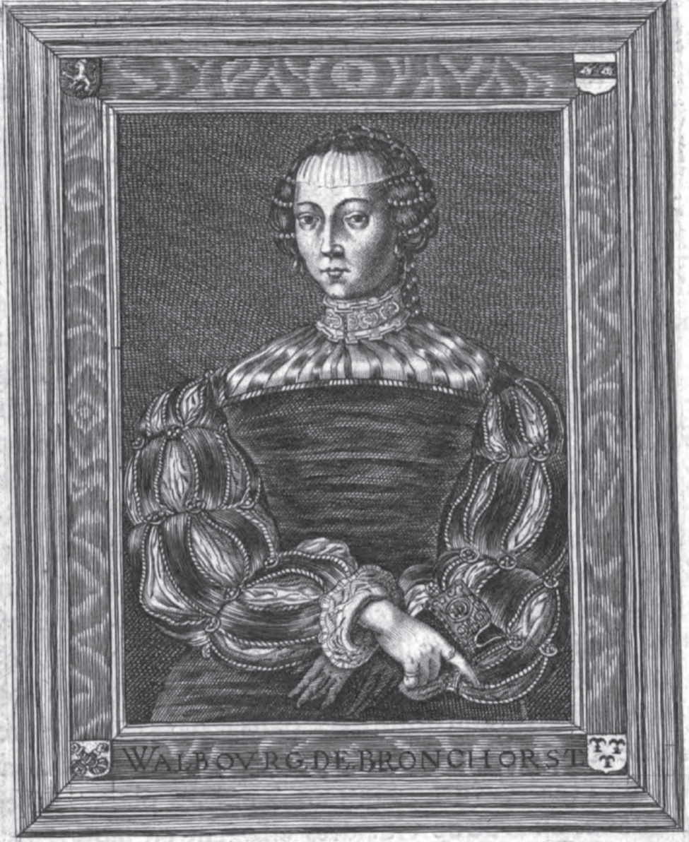 Walborg de Bronckhorst ( -1504), epouse d'Etienne de Lynden, seigneur de Mussenbergh